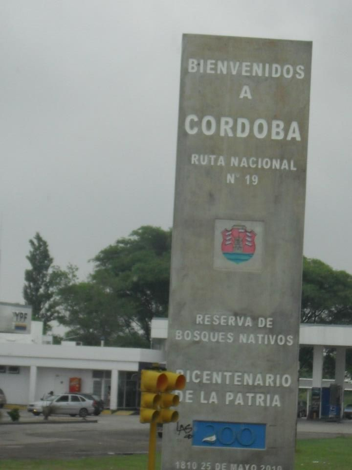 Cartel de acceso a la Provincia de Córdoba por Ruta 19. Ciudad de San Francisco.